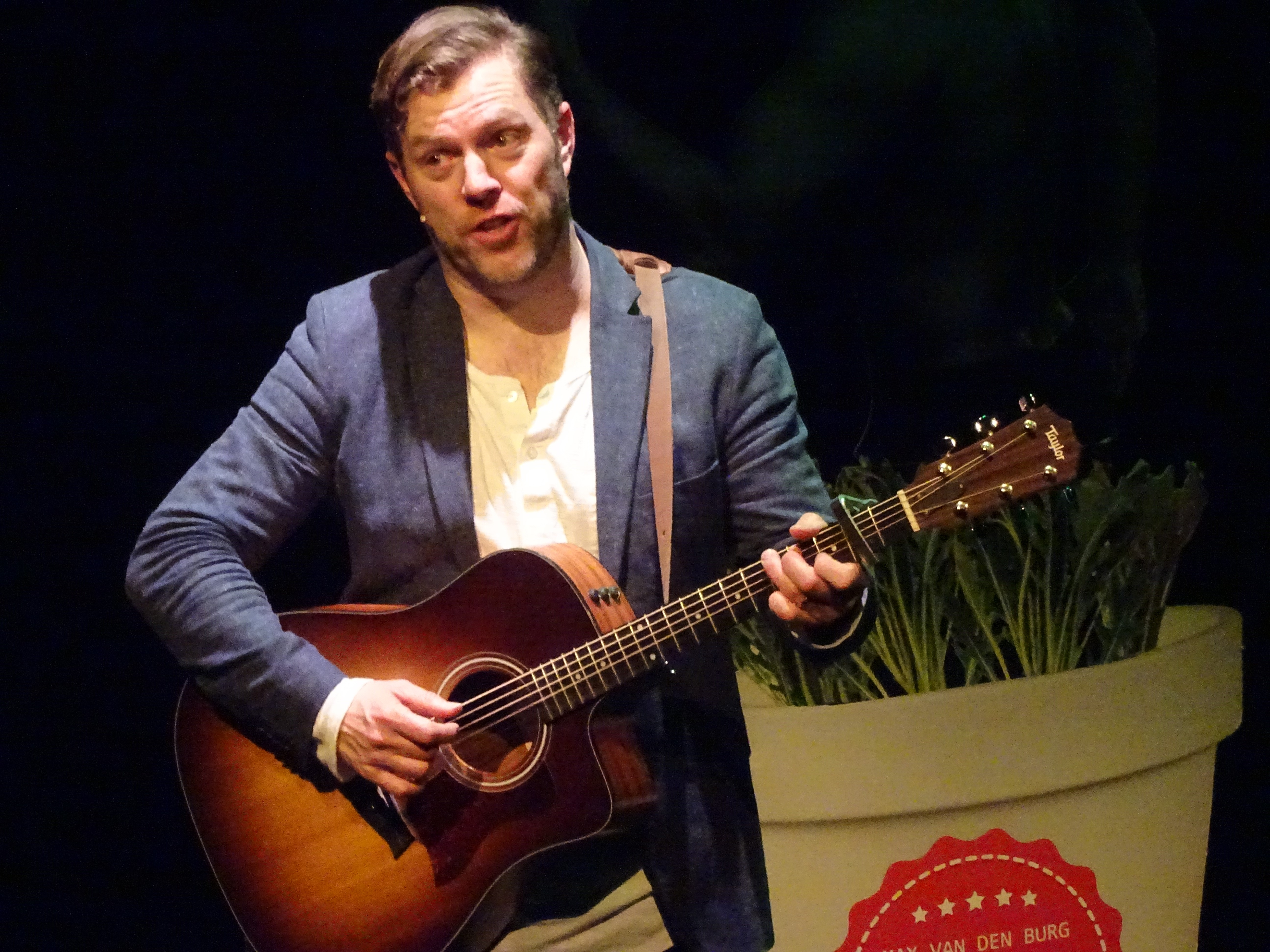 Max van den Burg tijdens zijn theatershow ‘Op een bedje van rucola’